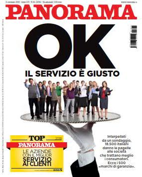 Copertina della rivista Panorama 25 gennaio 2018, Arnoldo Mondadori Editore.